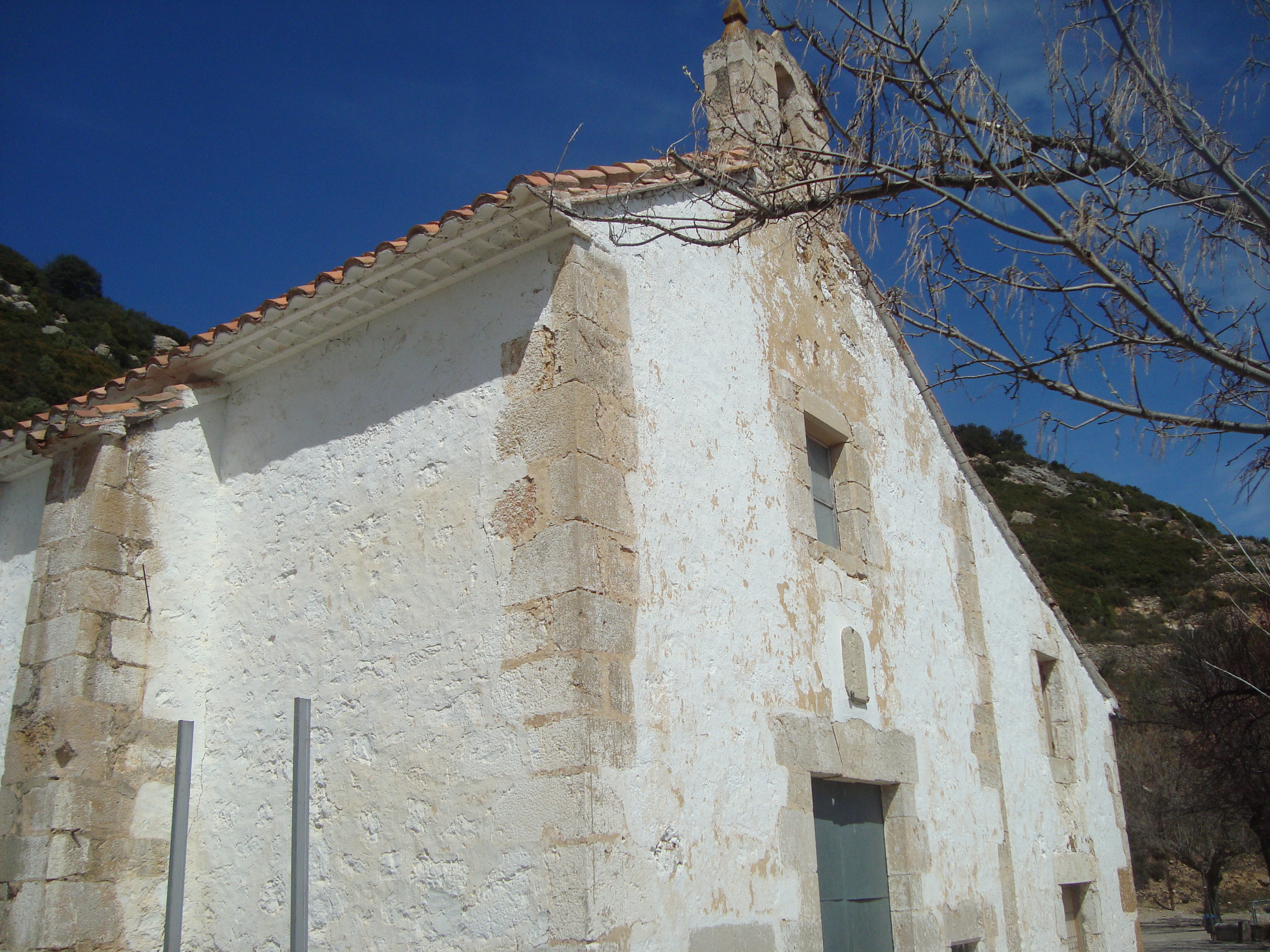 Ermita de Sant Miquel Arcàngel (la Serra d'en Galceran) 05.105-003.